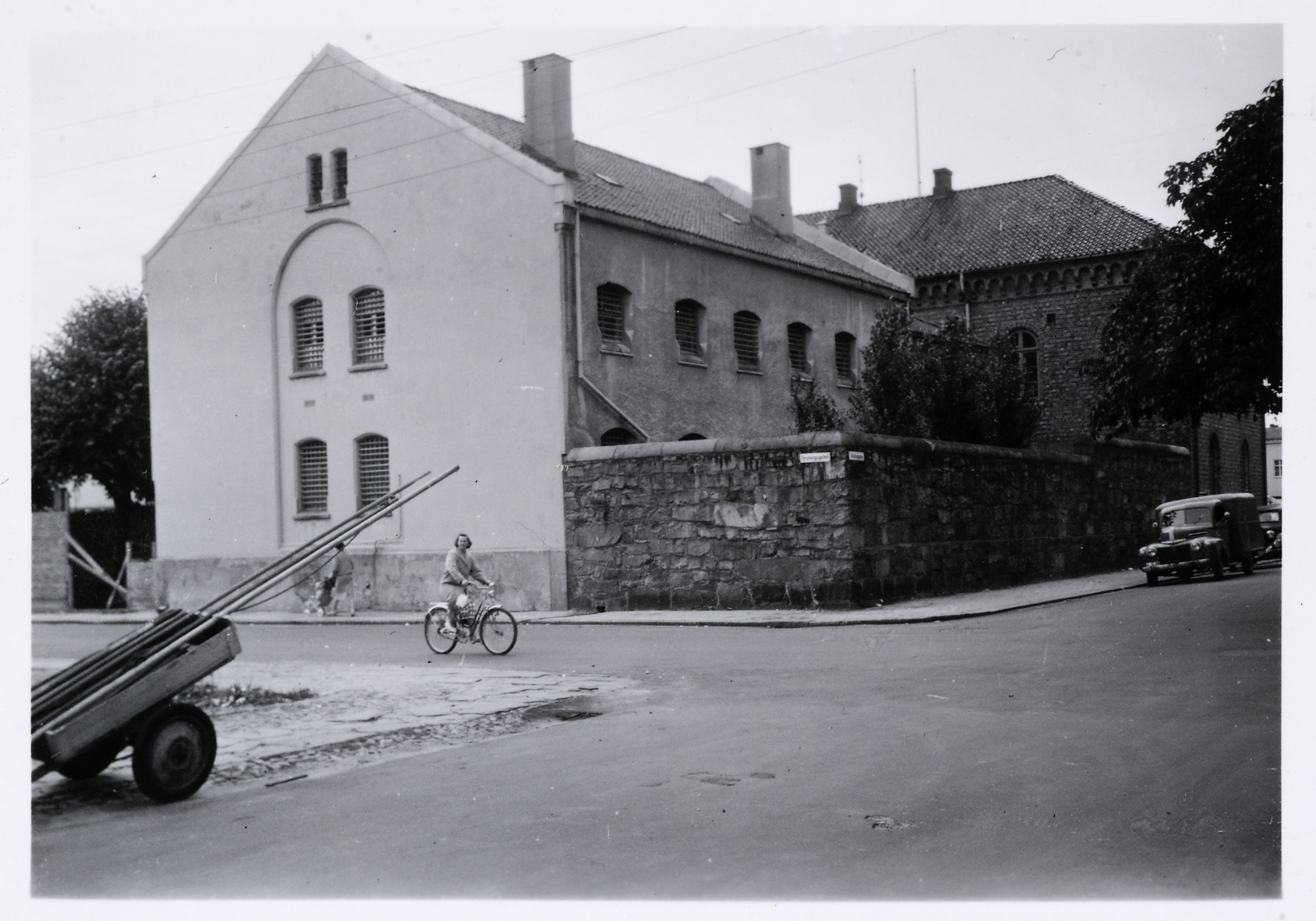 Bildet er hentet fra Arkivverket. Fotografi av Kristiansand kretsfengsel. Eksteriør fra gaten Arkivinstitusjon : Riksarkivet Arkivnavn : Justisdepartementet, Fengselsstyret D Sted : Norge, Vest-Agder, Kristiansand, Kristiansand Emneord: arkitektur, eksteriør, institsjonsarkitektur, kretsfengsel, Kristiansand kretsfengsel, straff, straffeanstalter Avbildet